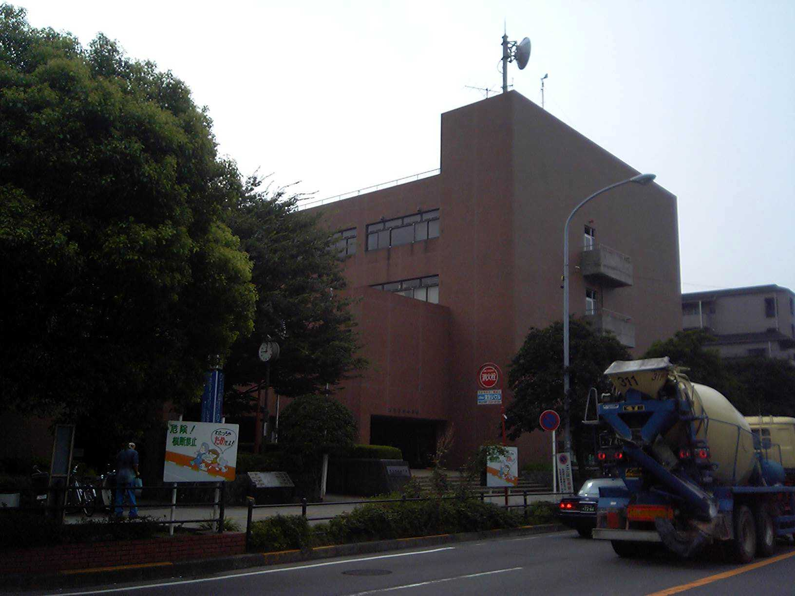 Kōhoku-ku Ward Office, Kōhoku-ku, Yokohama, Kanagawa, Japan (港北区役所)